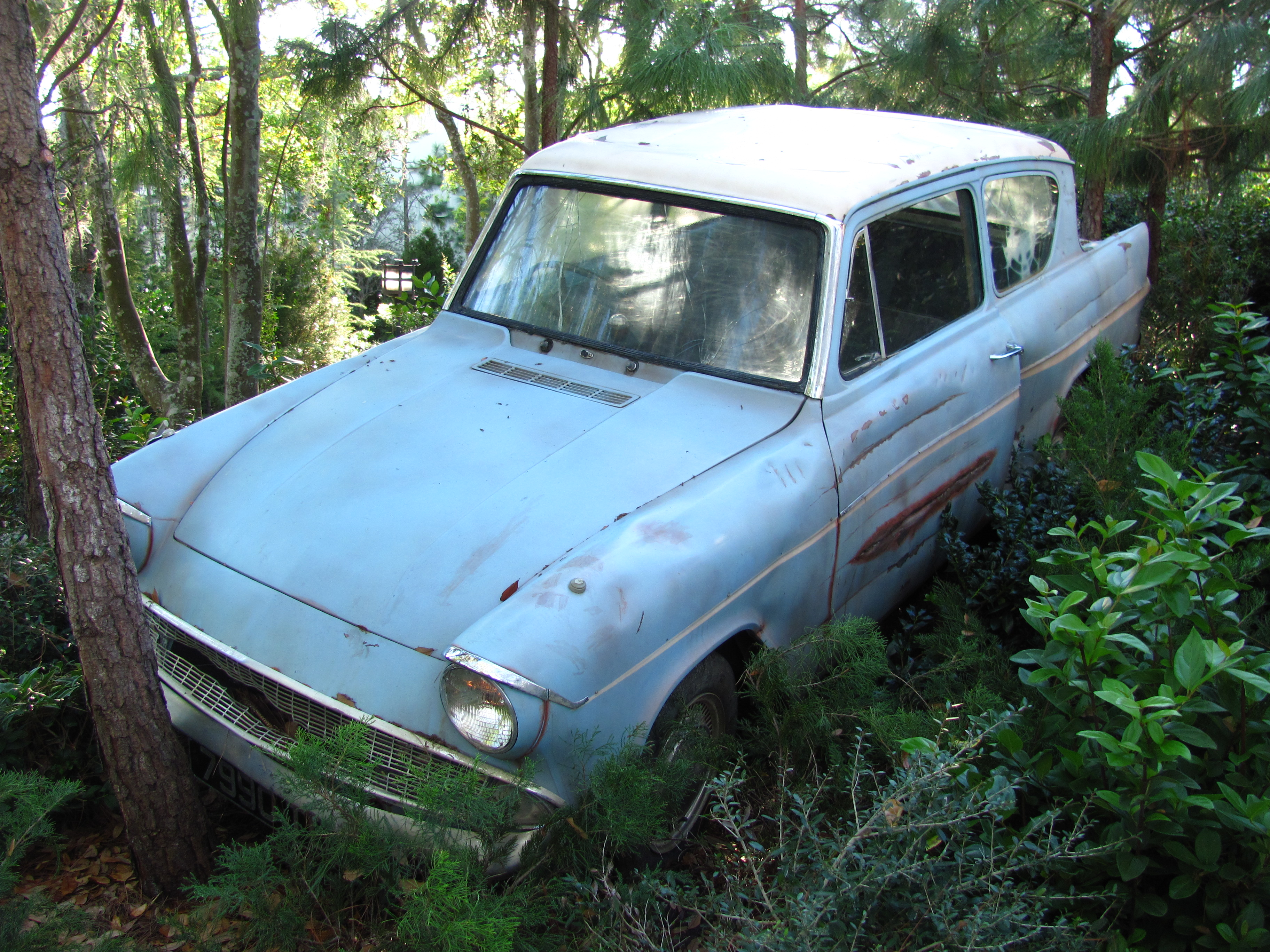 Dragon Challenge queue